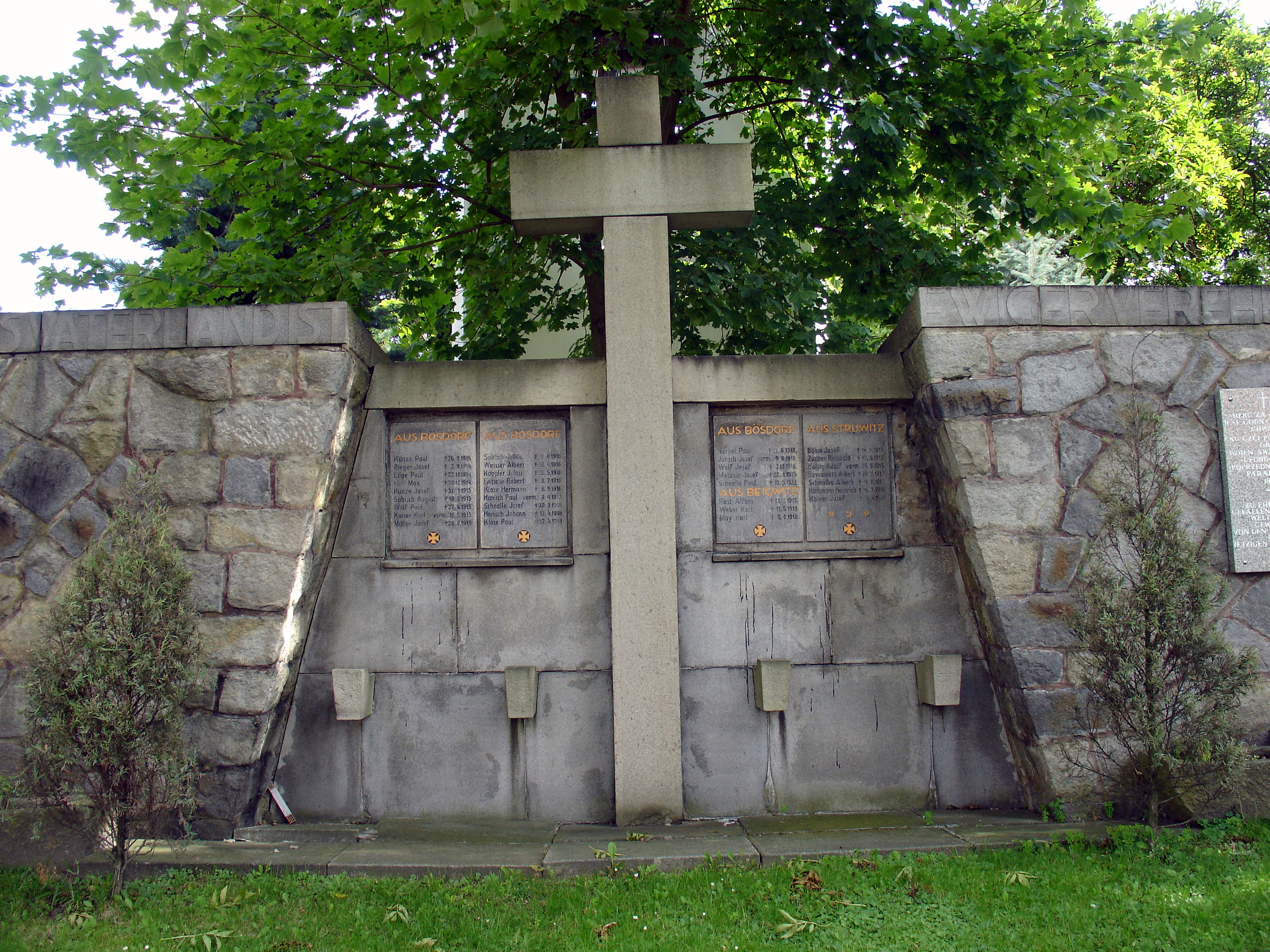 Pakosławice-pomnik poległych niemieckich żołnierzy z I i II wojny światowej przed kościołem ss. Piotra i Pawła